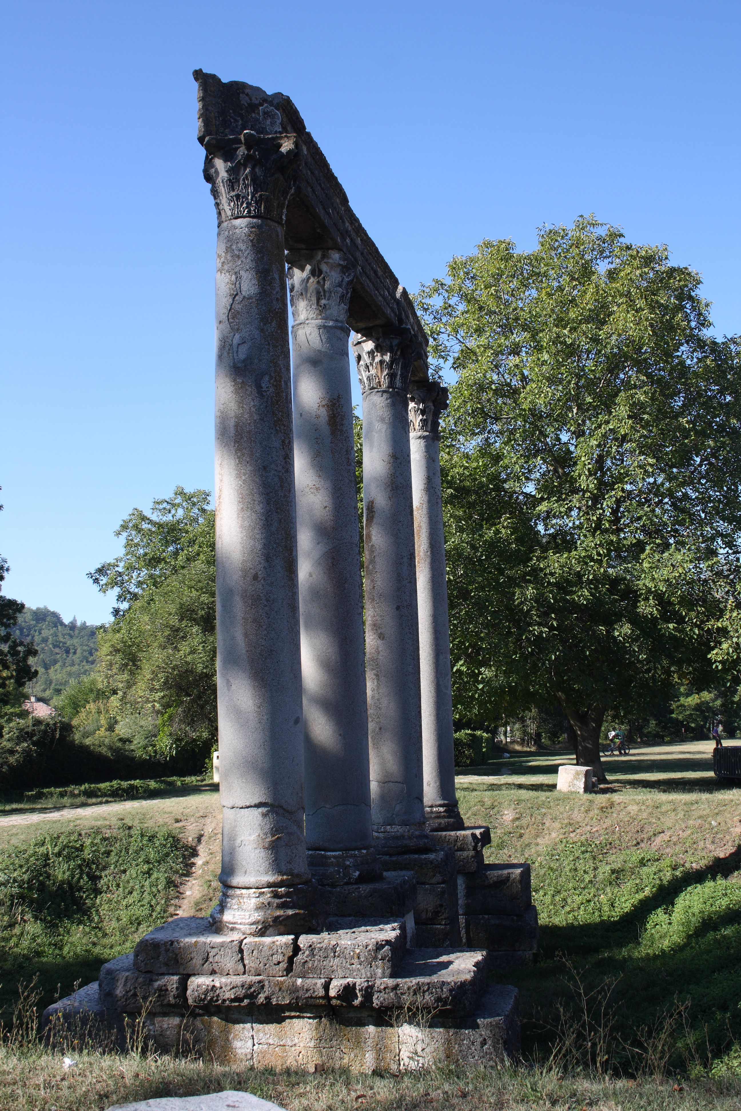 Überreste des römischen Tempels in Riez